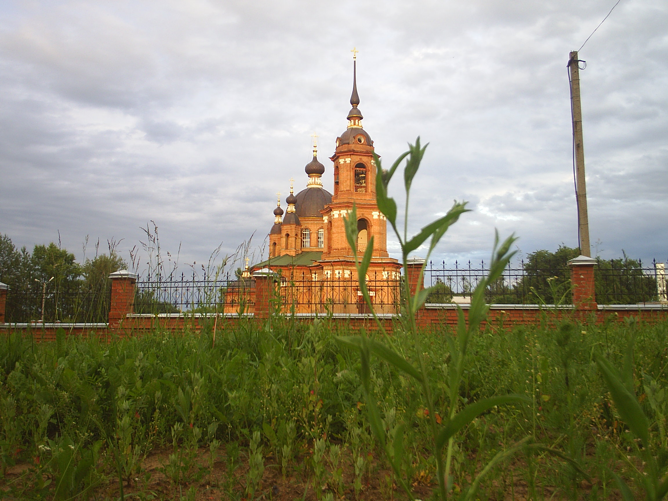 храм в Волгореченске